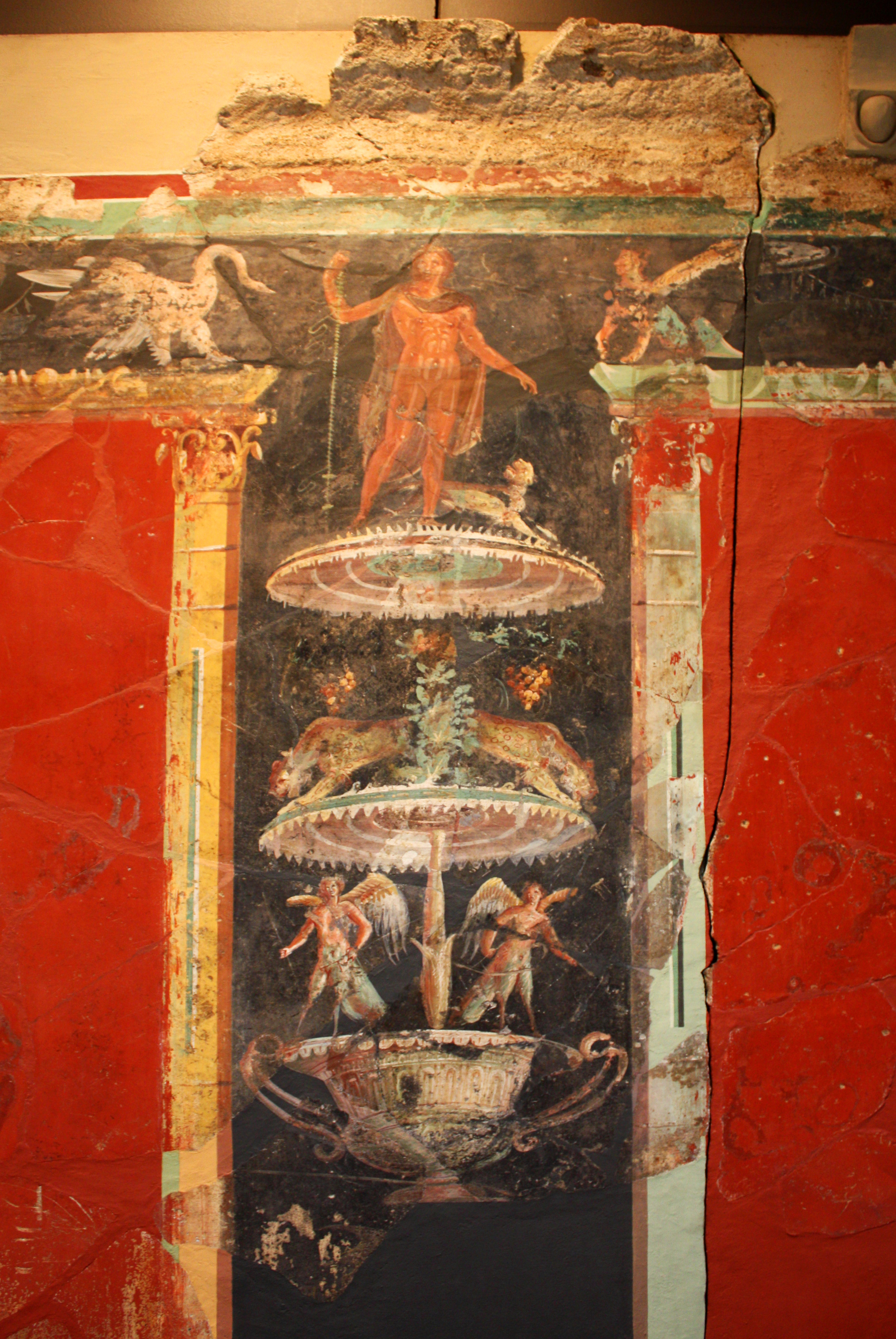 Rekonstruktion römischer Wandmalereien unter Einbindung geborgener Fragmente einer Kölner Villa. Ort der Ausstellung: Römisch Germanisches Museum in Köln.